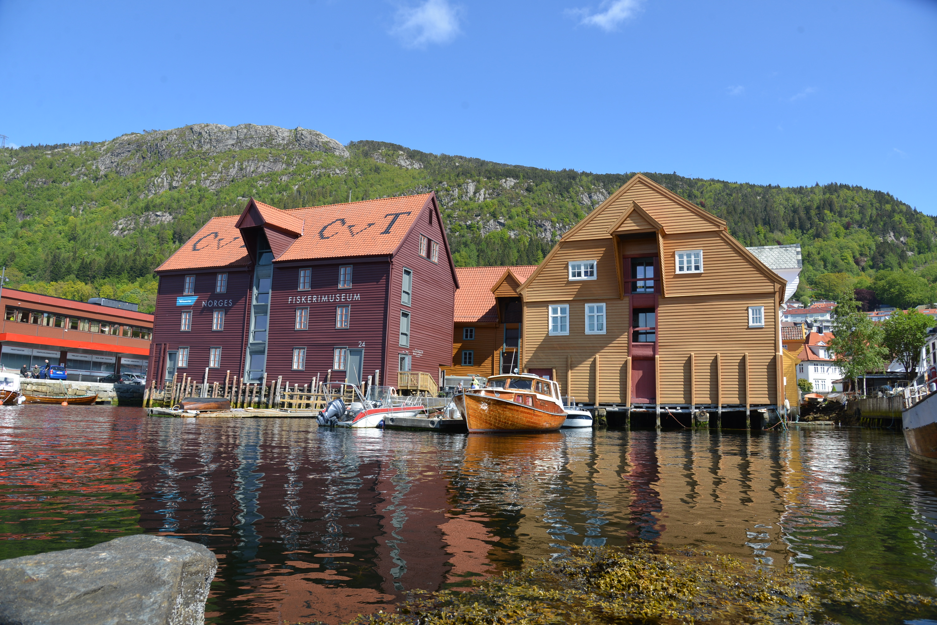 Norges Fiskerimuseum 3